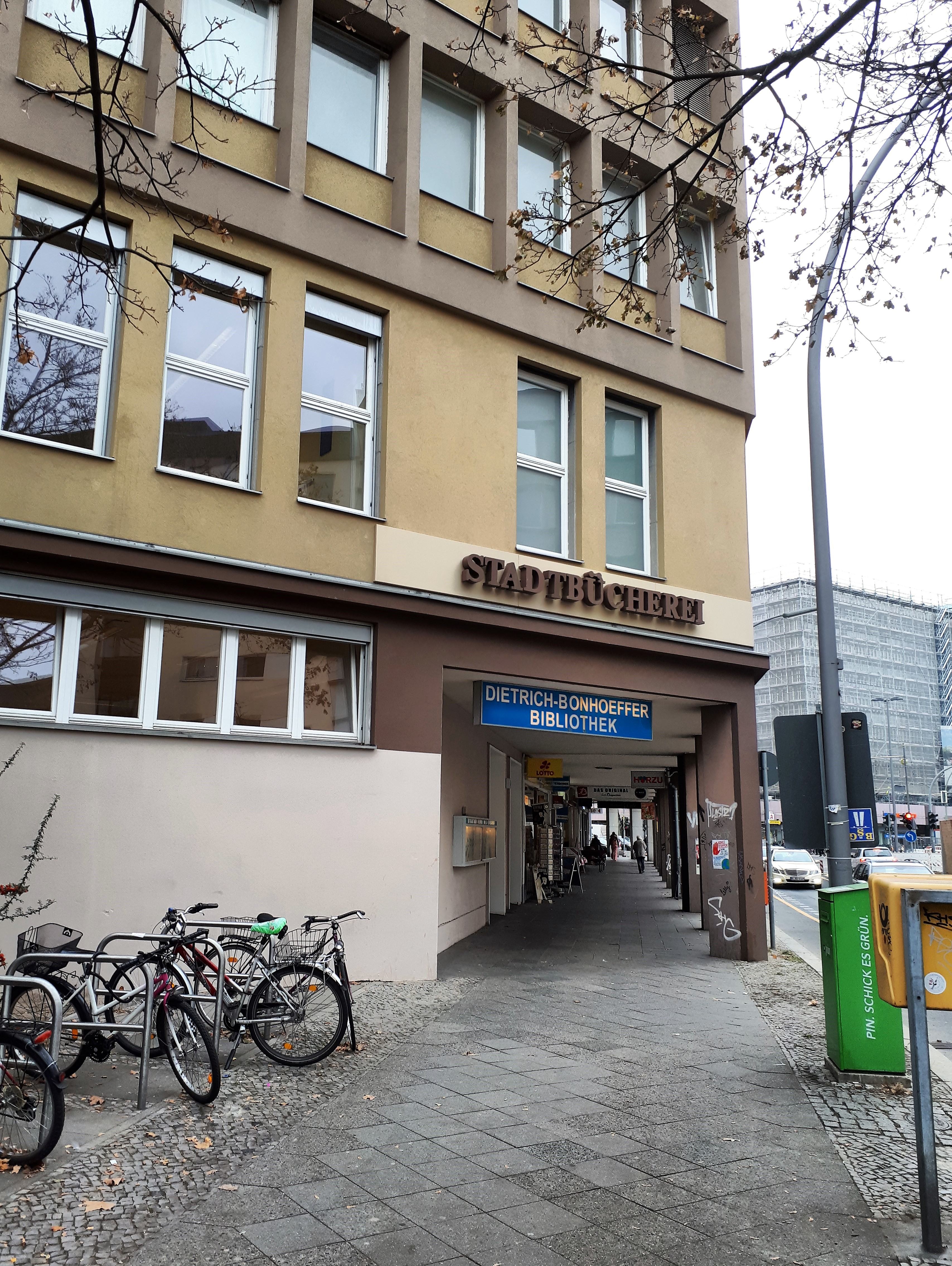 Wilmersdorf Brandenburgische Straße Stadtbücherei Dietrich Bonhoeffer-Biböiothek